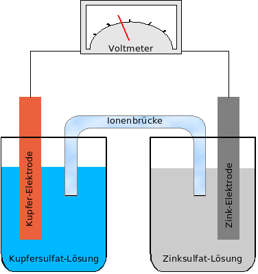 Galvanische Zelle